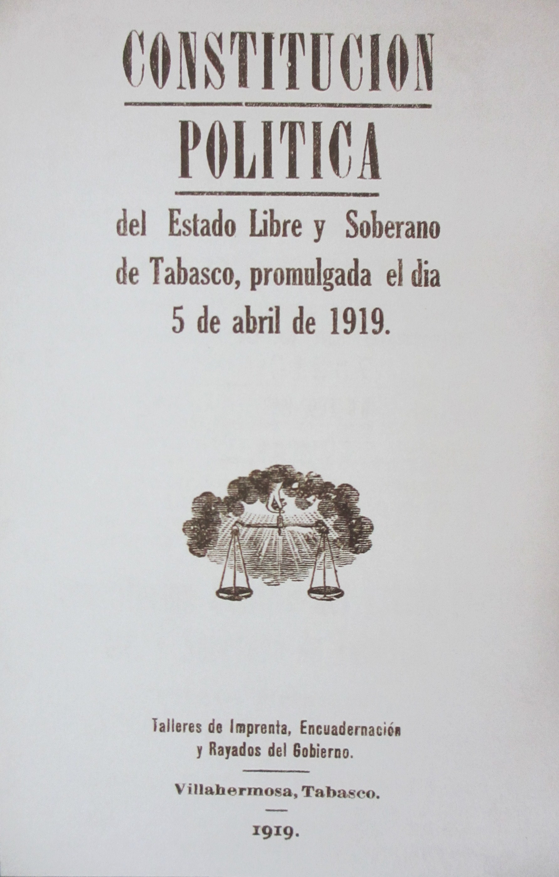 Portada de la Constitución Política del Estado Libre y Soberano de Tabasco, México. Promulgada por el Congreso Constituyente del Estado de Tabasco el 5 de febrero de 1919 y sancionada por el gobernador el general Carlos Greene Ramírez el 5 de abril de ese mismo año.